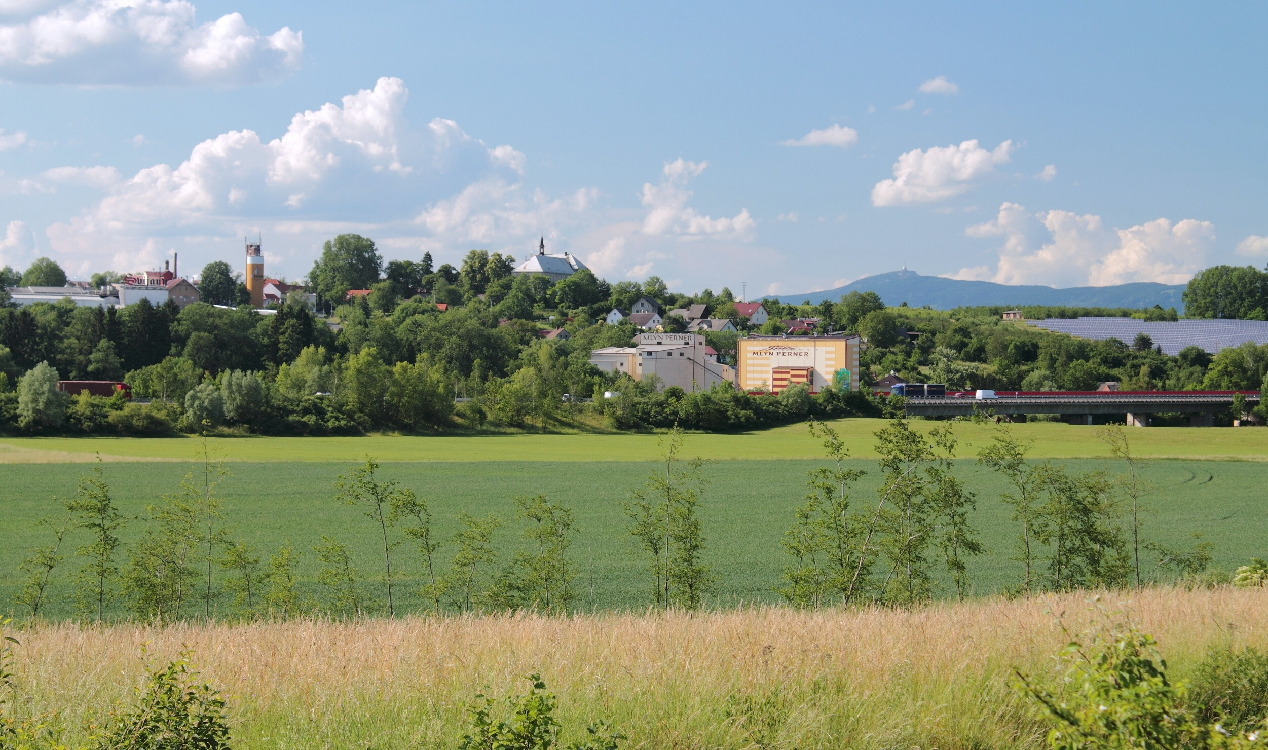 Svijany, pohled od Doubravy